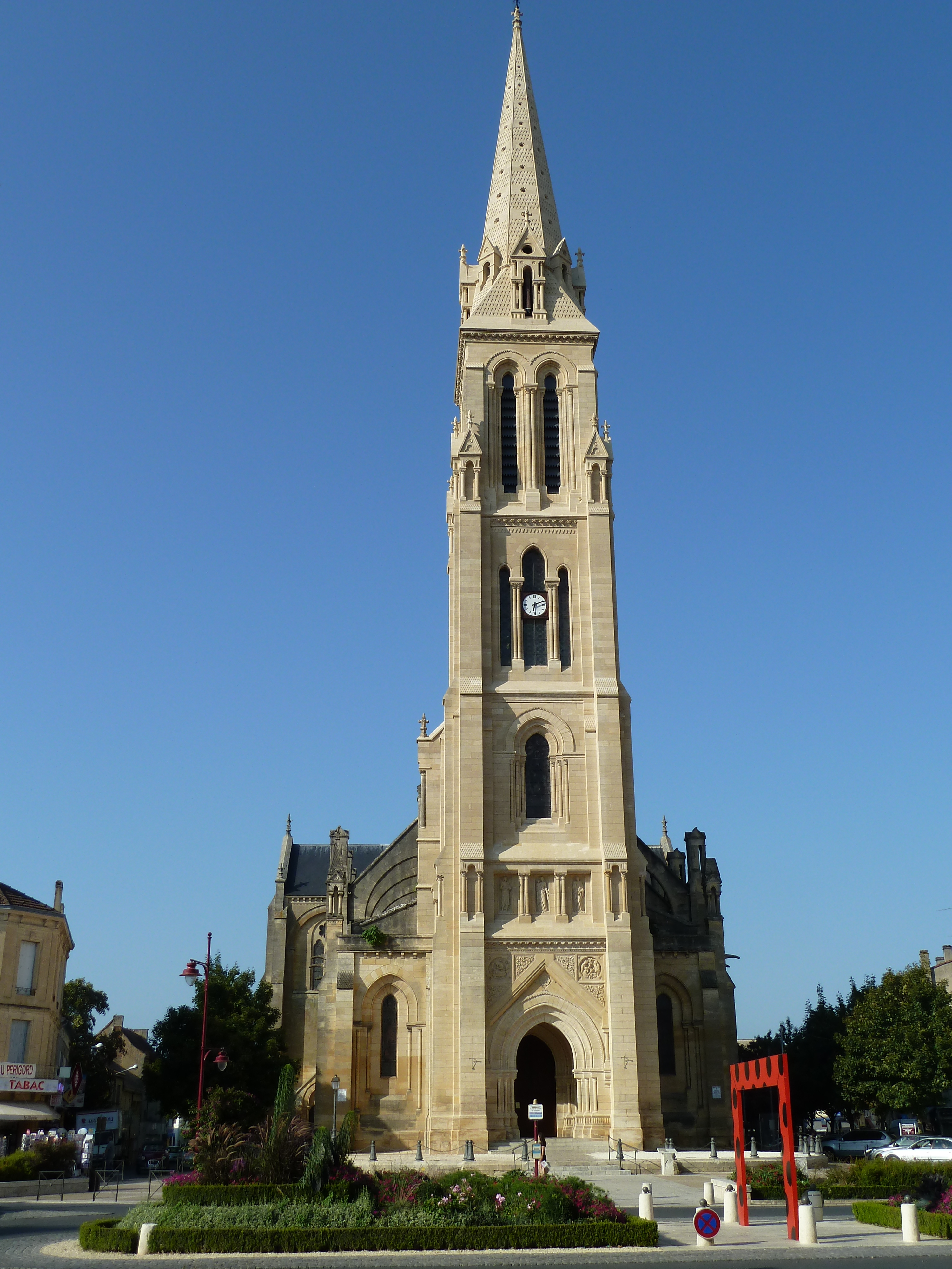 Église Notre-Dame (Bergerac)